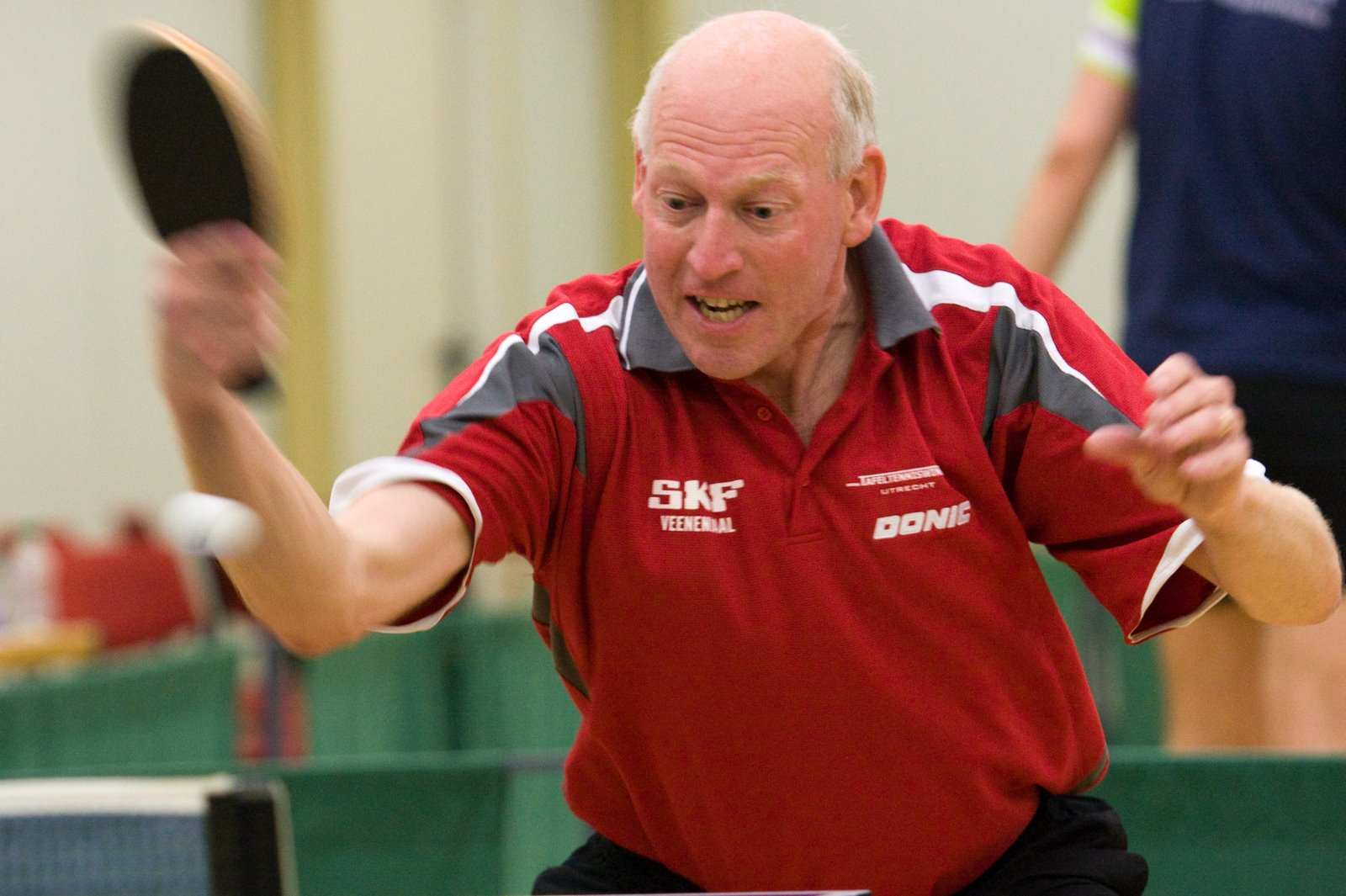 Ron van Spanje, 2009, Top 12 toernooi Deventer